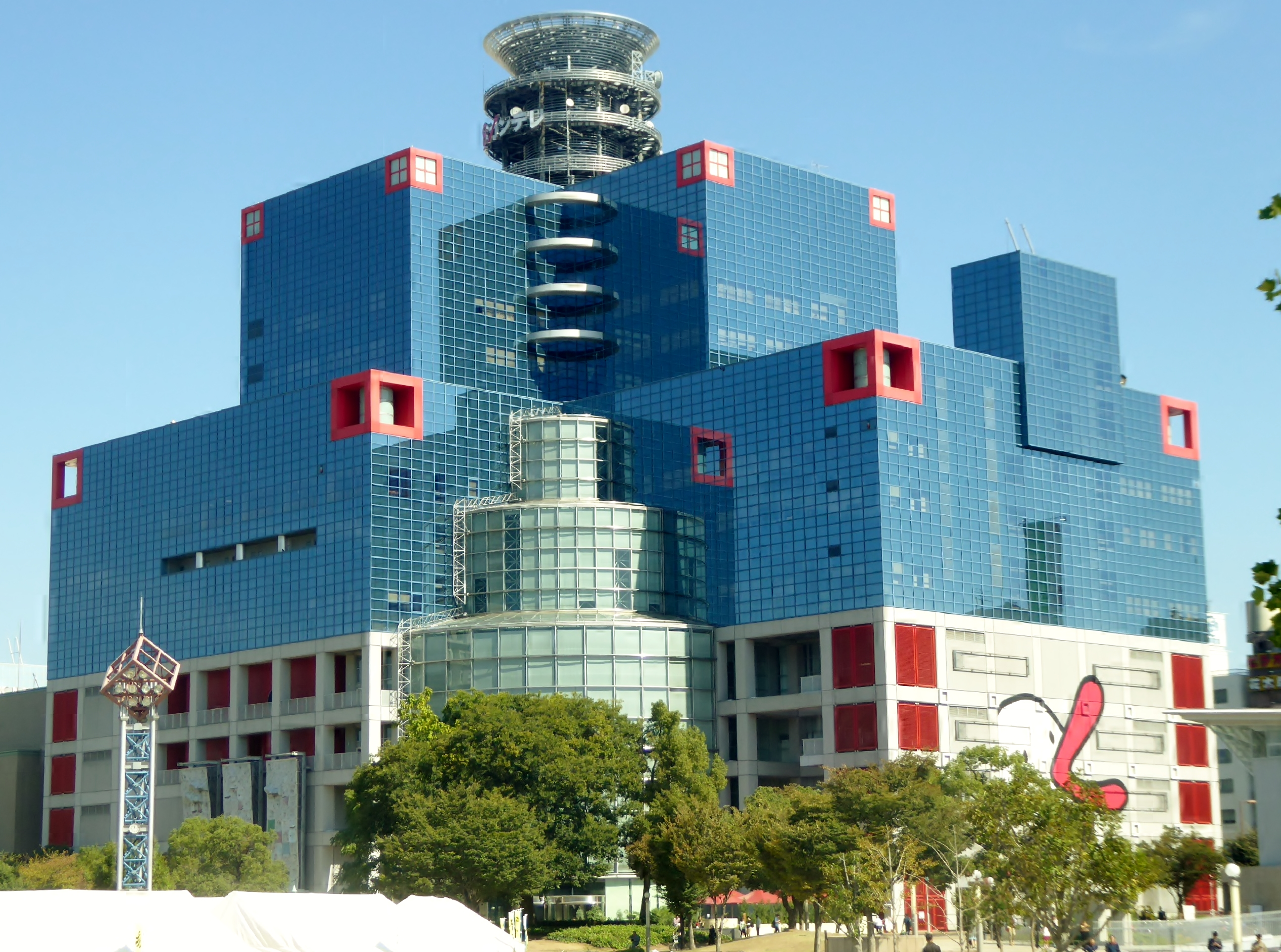 関西テレビ放送株式会社本社を撮影。